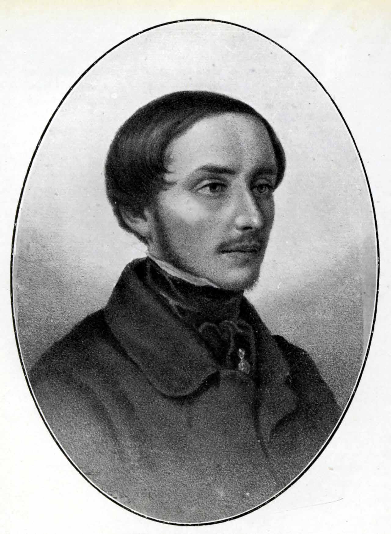 Patriota e militare italiano